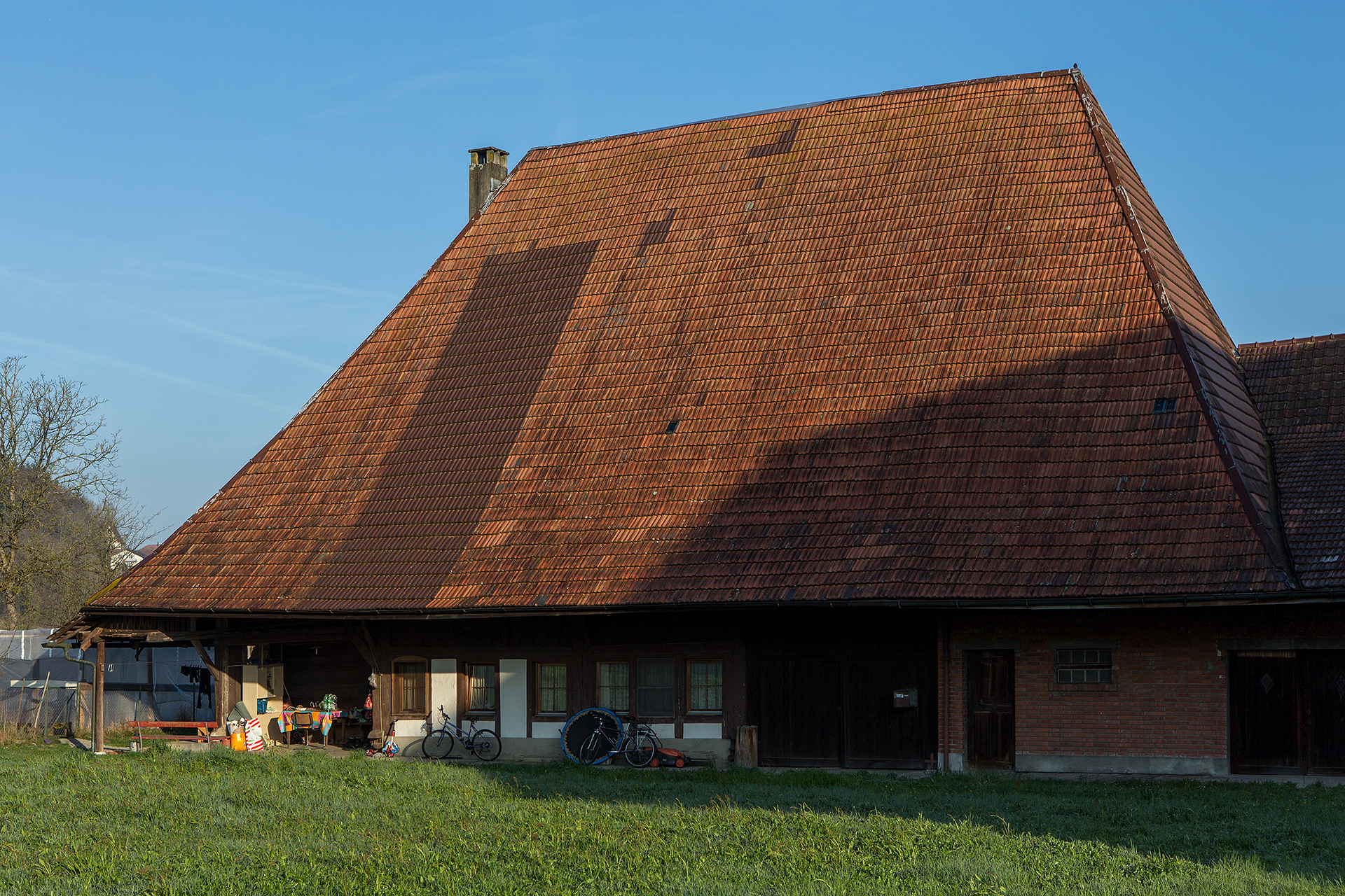 Hochstudhaus aus dem Jahre 1600 (?) an der Brittnauerstrasse 54 in Strengelbach (AG)